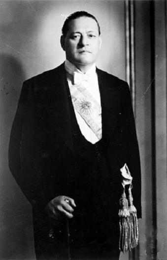 Fotografía oficial del presidente argentino Roberto M. Ortiz (1886 - 1942)